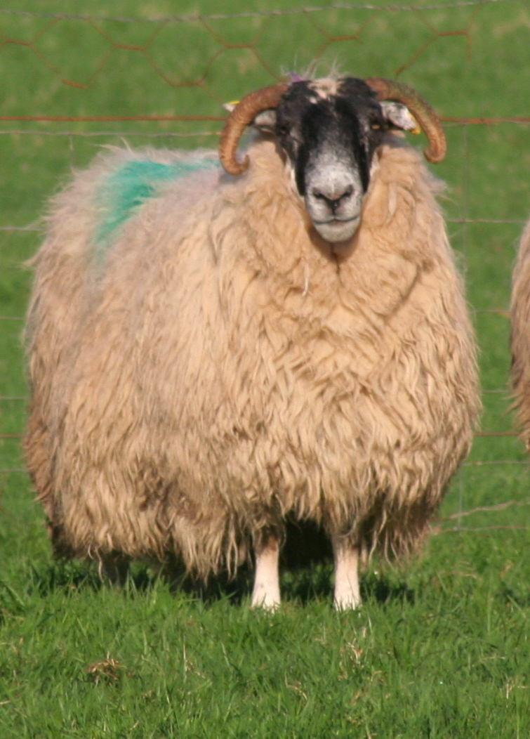 Bélier